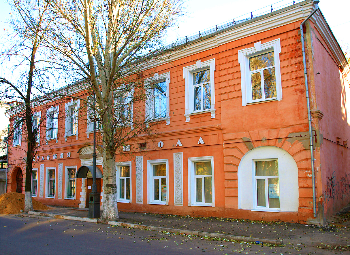 Луганськ. Художня школа (вулиця Поштова)